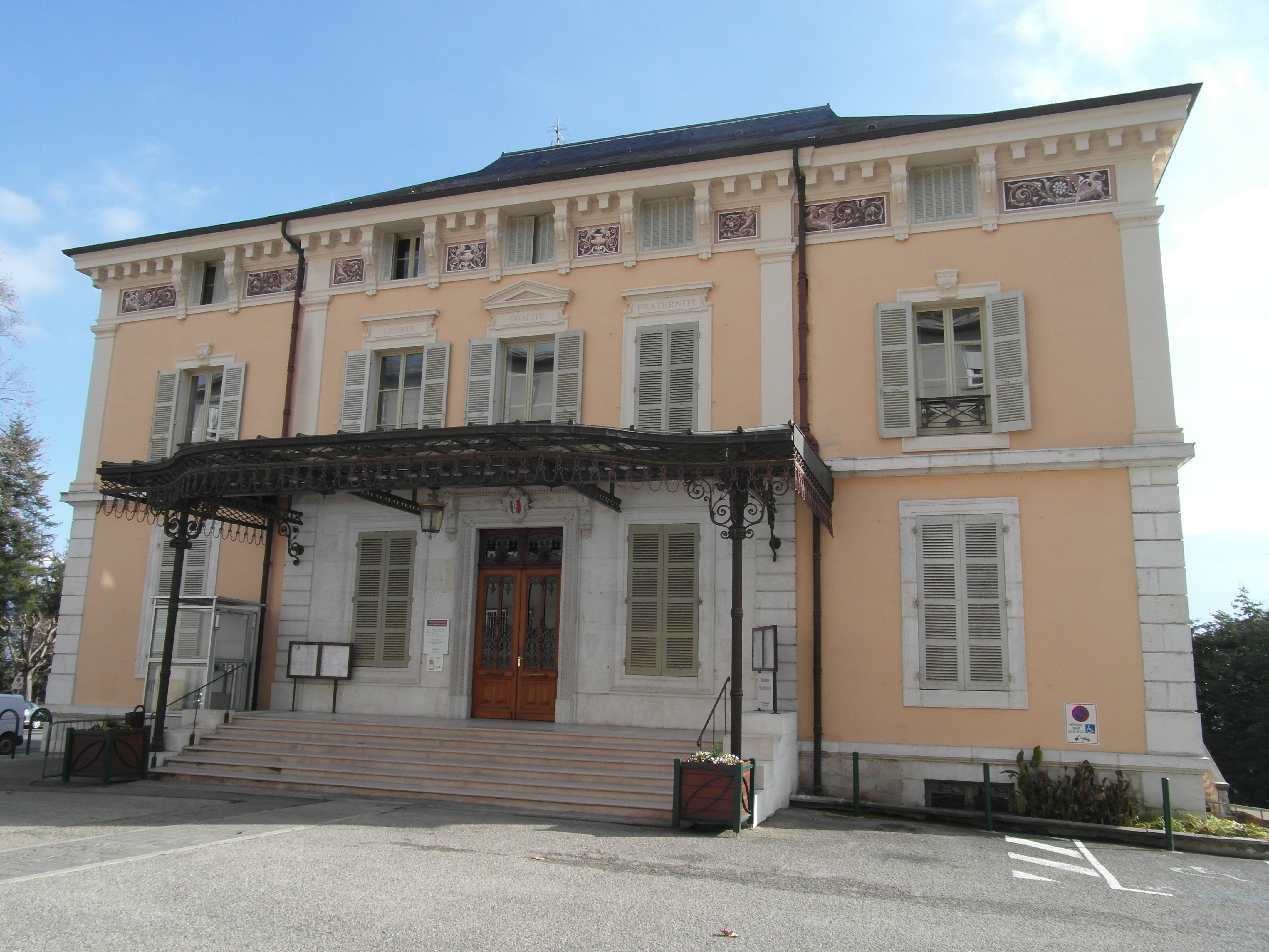 mairie de Tullins